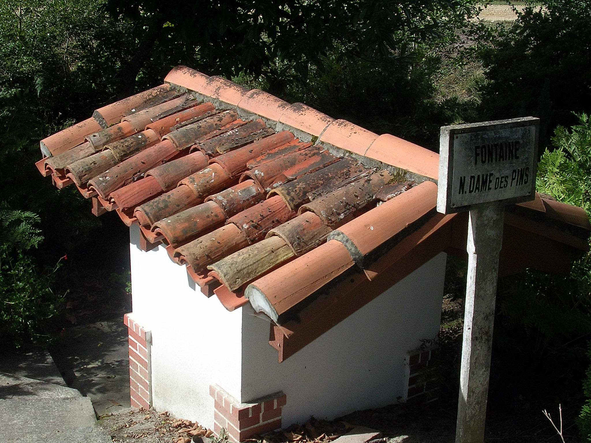 Fontaine Notre-Dame des Pins, à Aurice, dans le département français des Landes